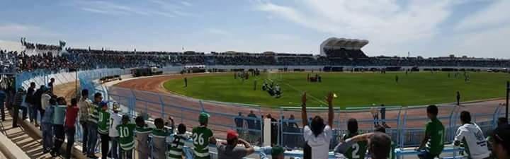 Public lors d'un match comptant pour la coupe de la confédération CAF.